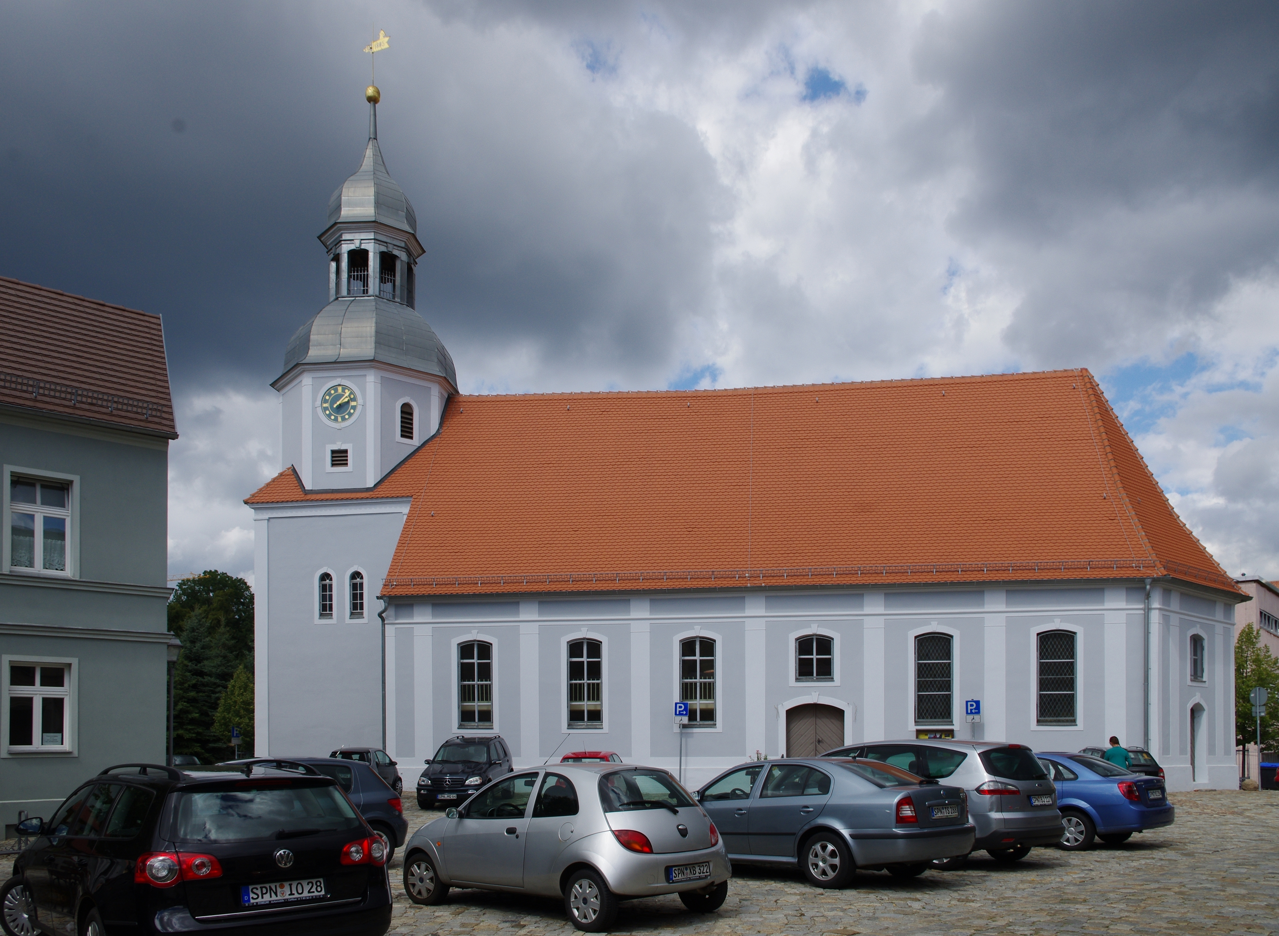 Drebkau in Brandenburg. Die Kirche am Markt steht unter Denkmalschutz.